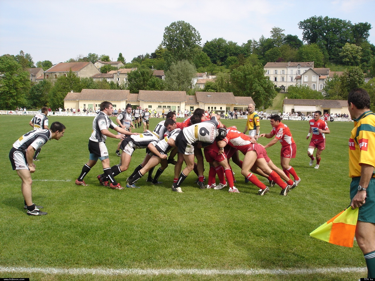 Match Fumel - Niort (Fédérale 2) Avril 2007